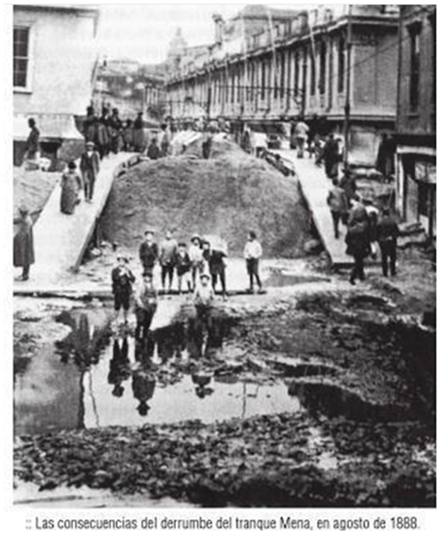 Colapso del embalse mena.